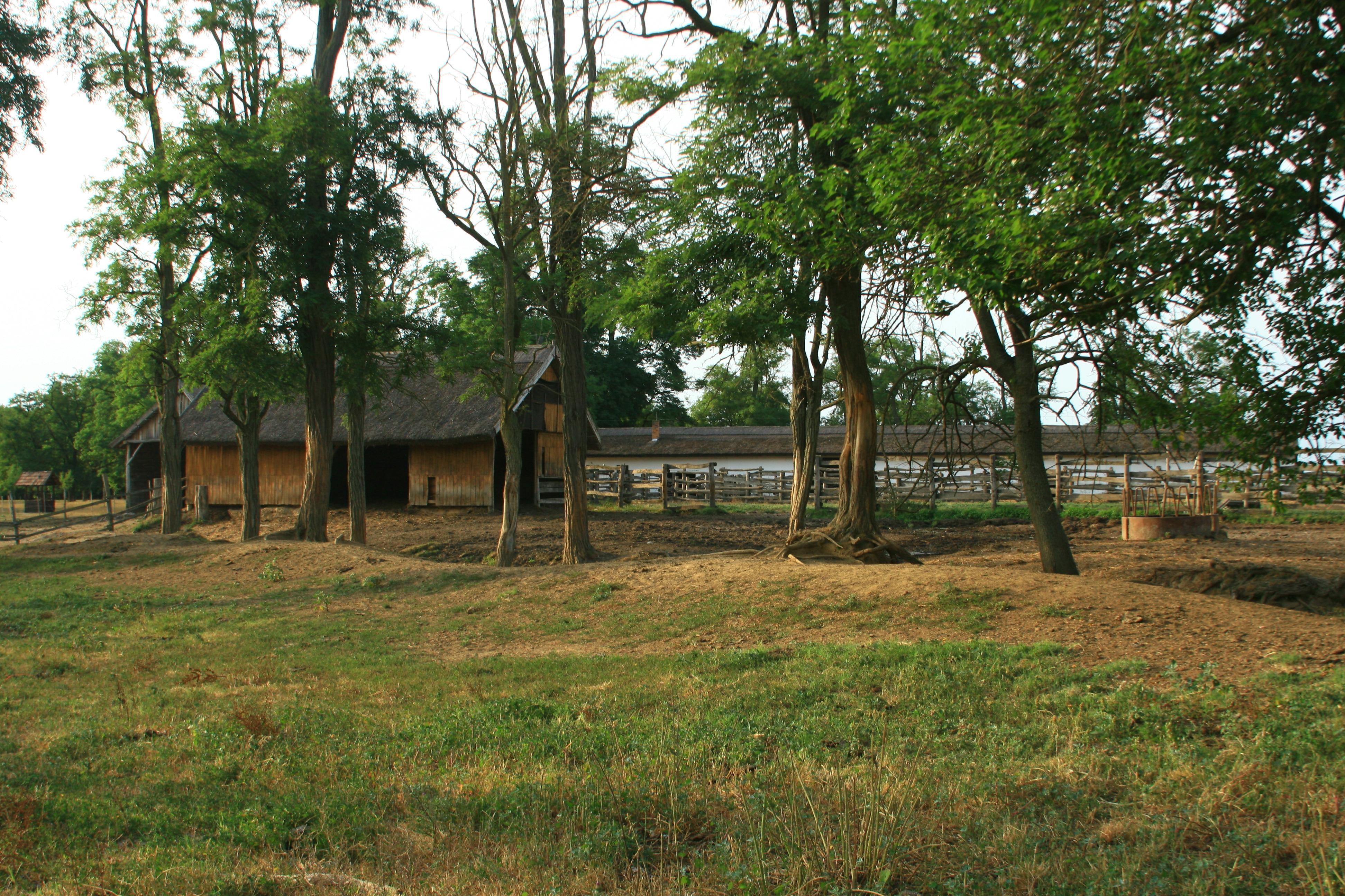 Zalakomár, Kiskomárom, 8751 Hungary